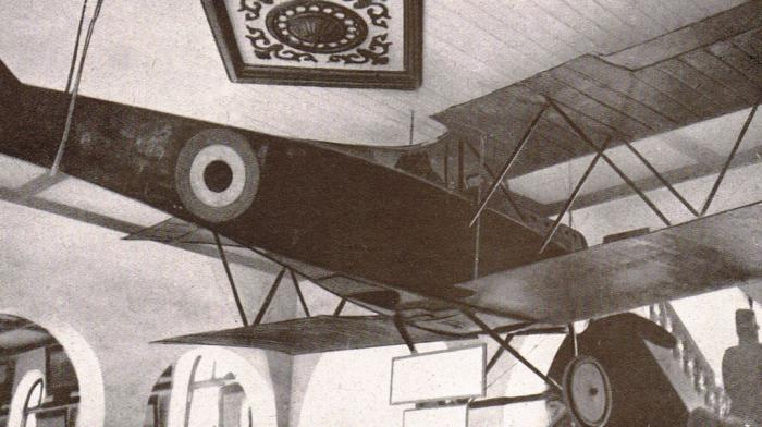 Aereo usato da Ferrarin per il raid Roma-Tokio, esposto al museo imperiale.